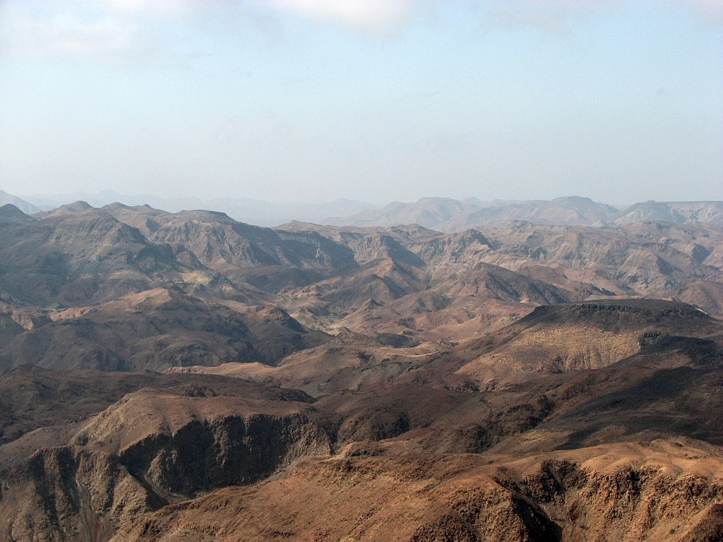 Při přiblížení na džibutské letiště